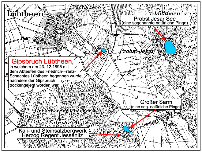 Lage des ehemaligen Gipsbruches Lübtheen.